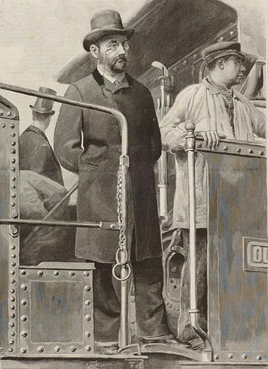 Illustration sur Zola - ca 1895